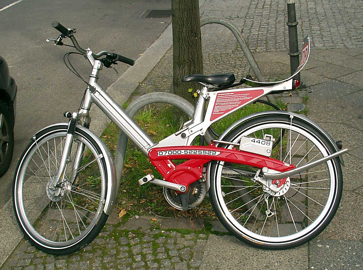 Autor: Ralf Roletschek Quelle: vom Autor fotografiert gfdl